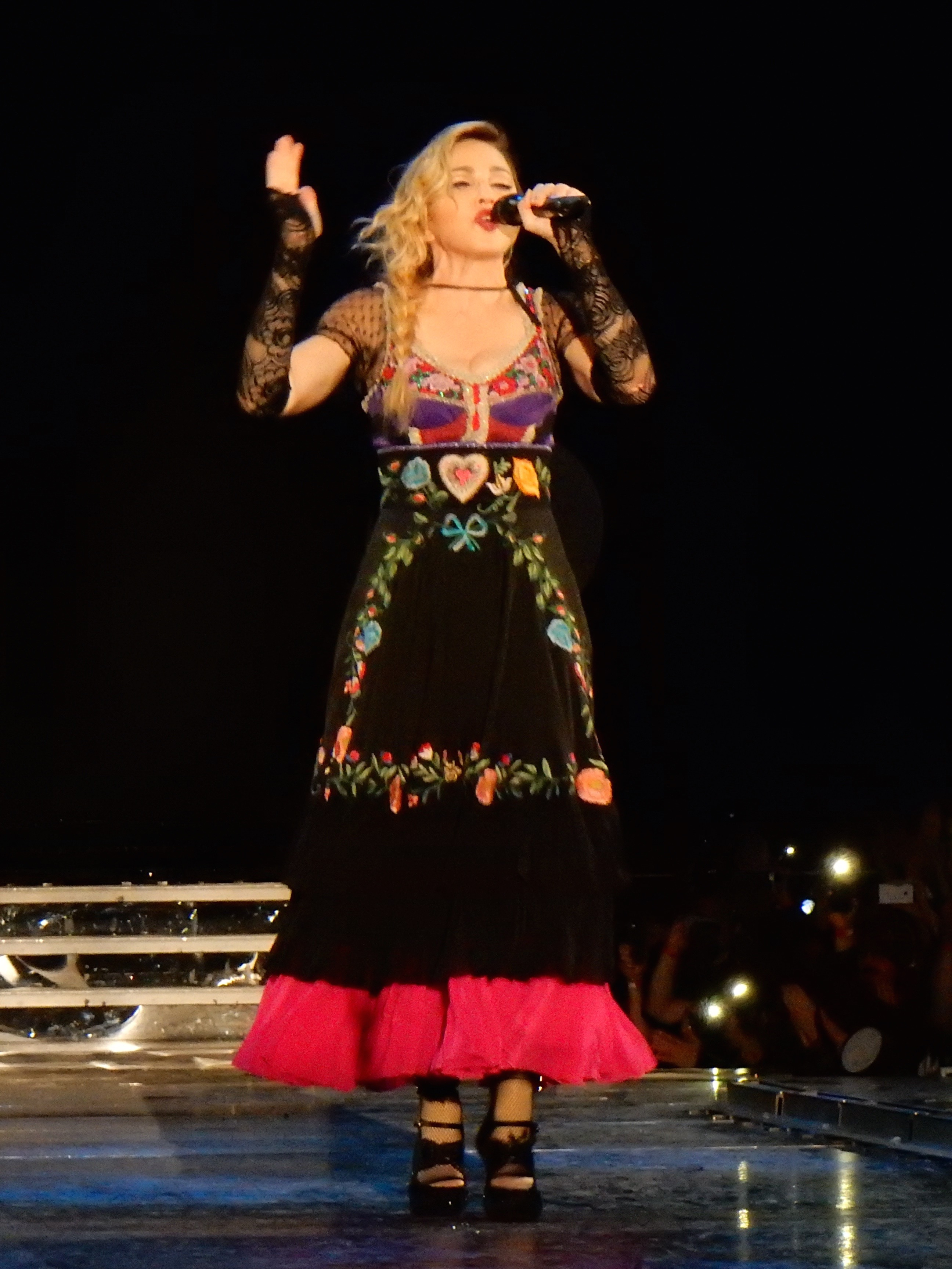 Madonna Rebel Heart Tour 2015 - Stockholm